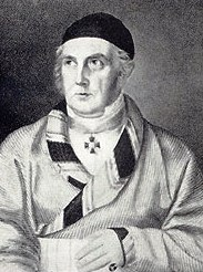 Friedrich August Alexander Eversmann (1765-1837)